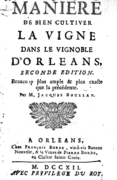 Page de couverture de l'ouvrage du chanoine orléanais Jacques Boullay, Manière de bien cultiver la vigne dans le vignoble d'Orléans : beaucoup plus amples et plus exacte que la précédente, François Borde, Orléans, 1712, 2e éd., 206 p.